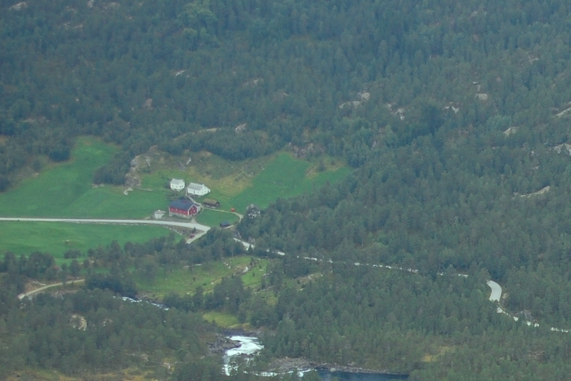 Gaular kommune], Sogn og Fjordane.